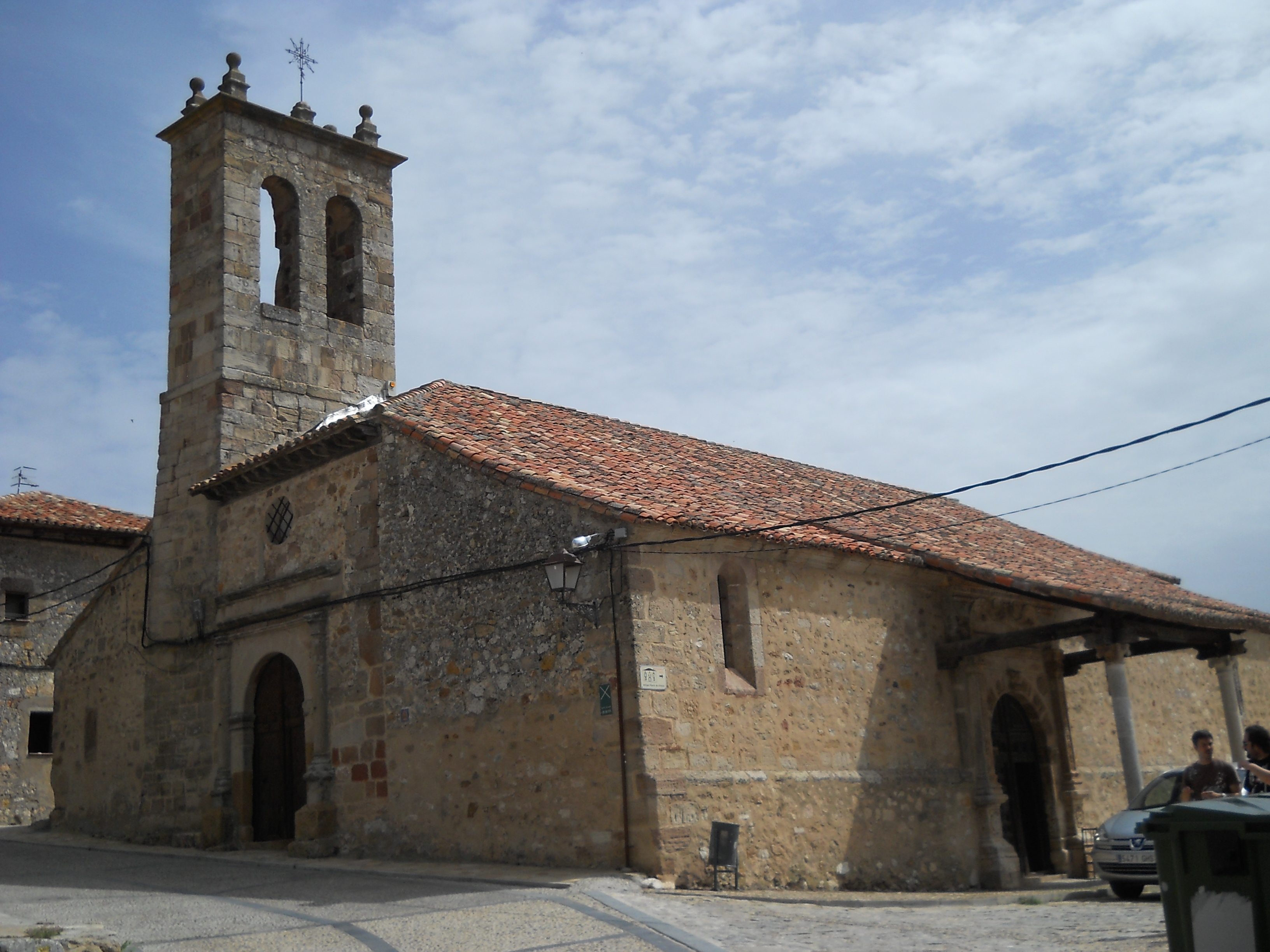 Iiglesia de San Gil, Atienza, Guadalajara, España